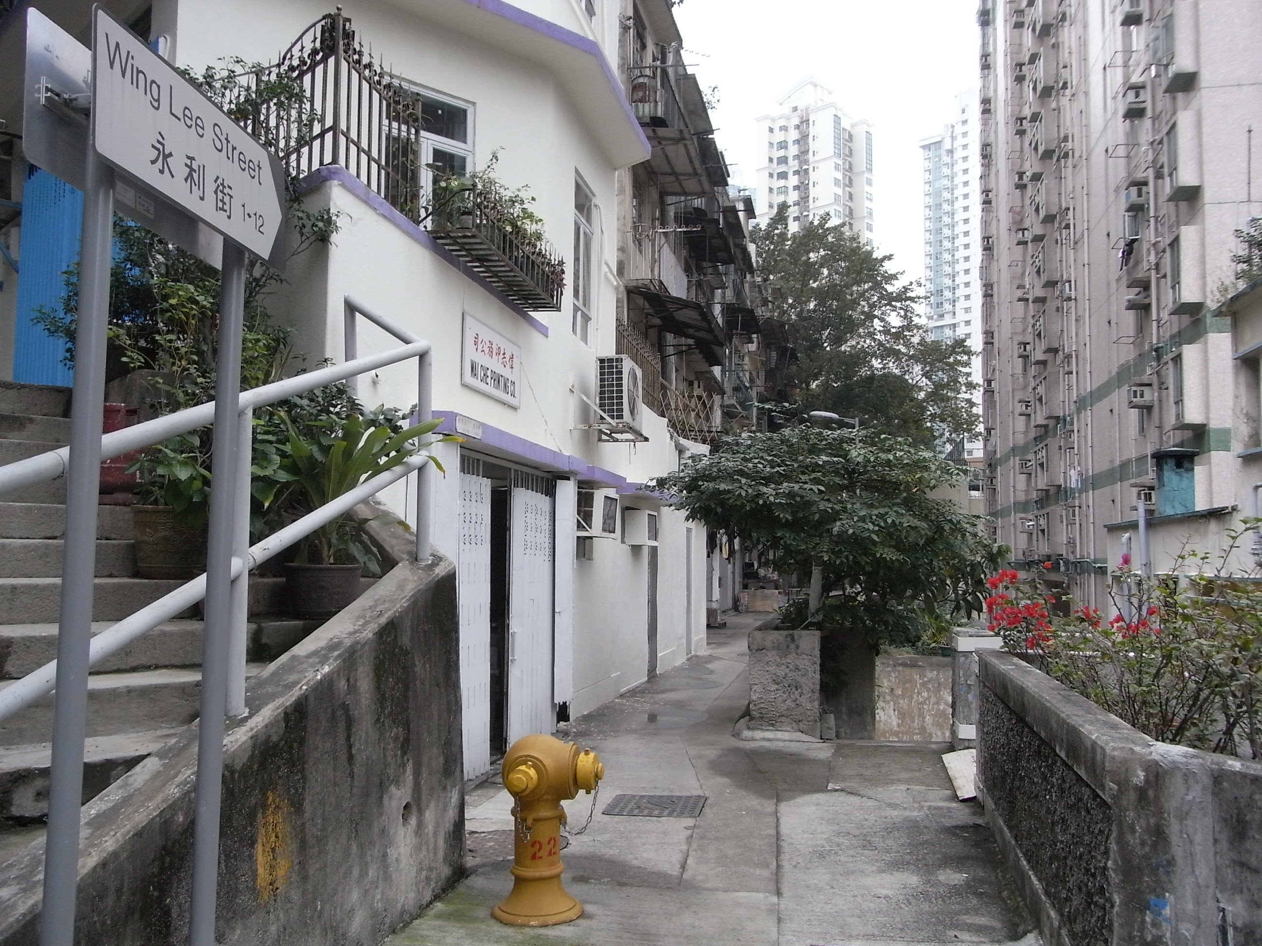 香港上環永利街